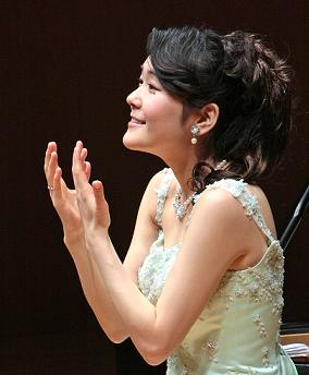 中村初恵さんの横浜みなとみらいホールでの1st.リサイタルコンサートの写真です。